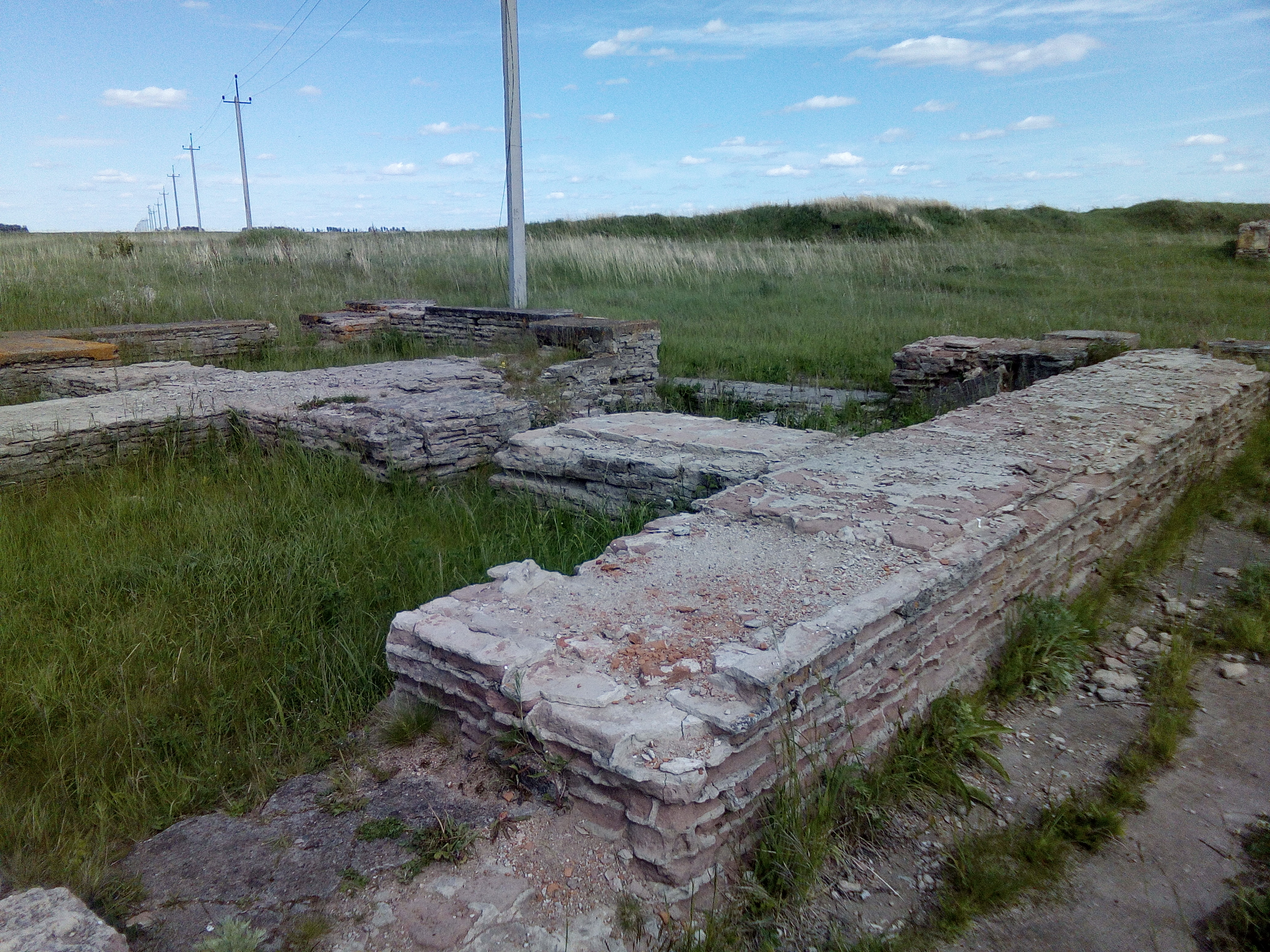 Дом Феодала